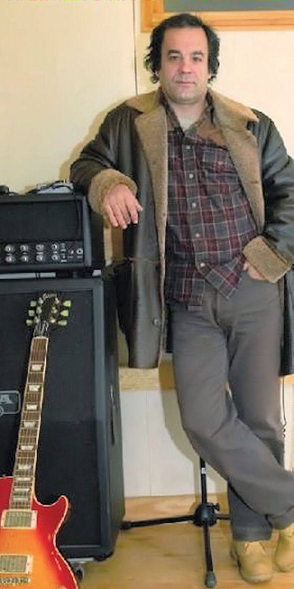 Francisco Landum, aka, Ricardo Landum. Músico, compositor, produtor (Musician, composer, producer).